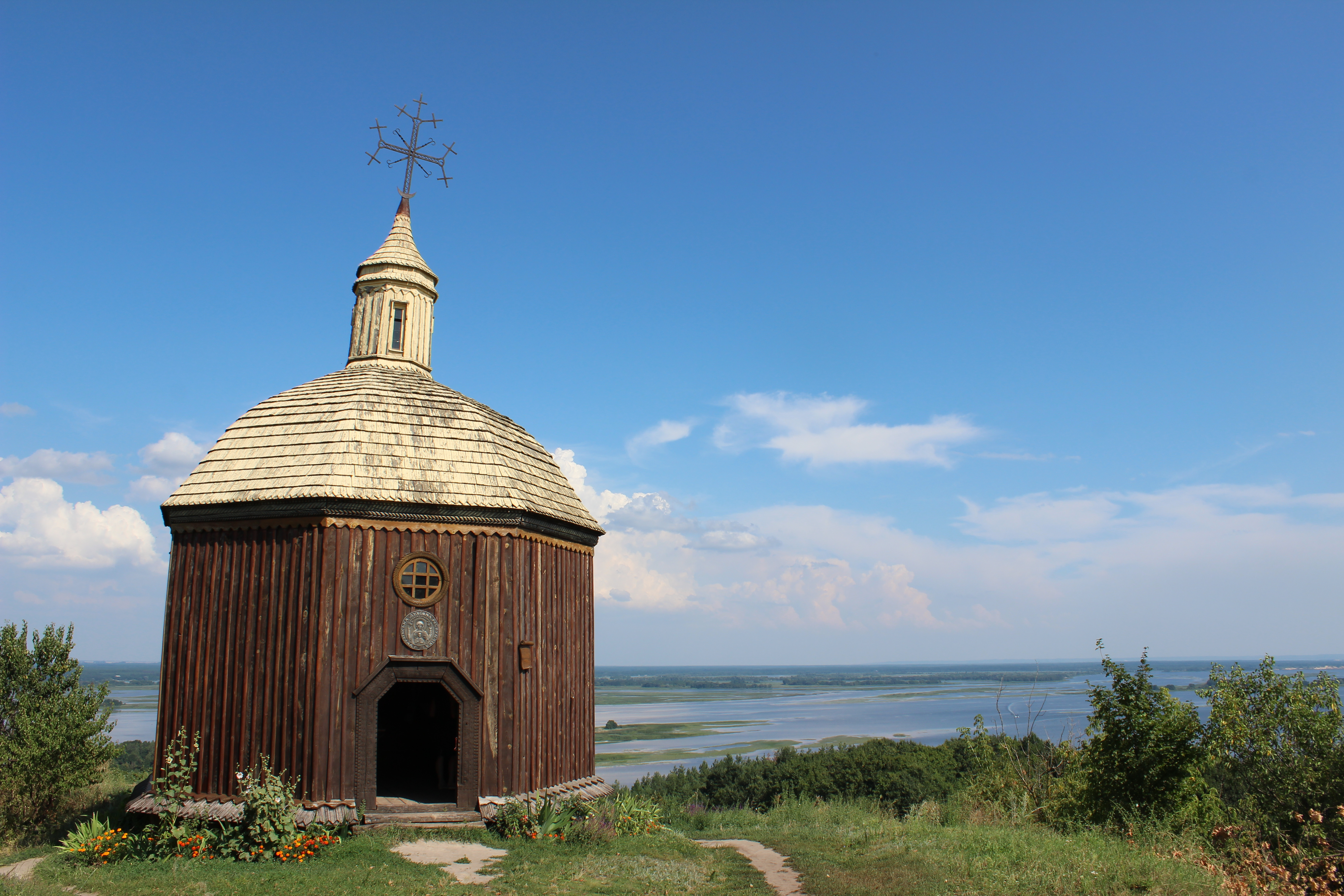 Городище літописного міста Святополча, Витачів